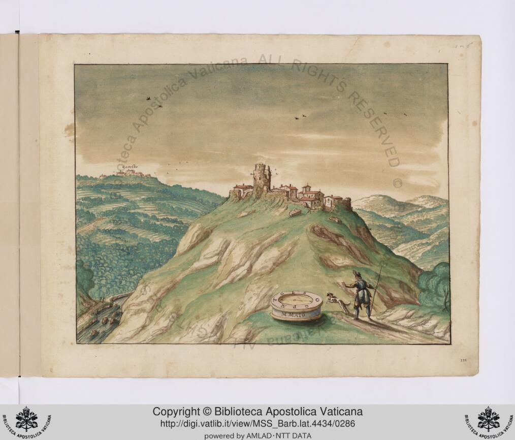 Caresto sullo sfondo della tavola del codice barberiniano